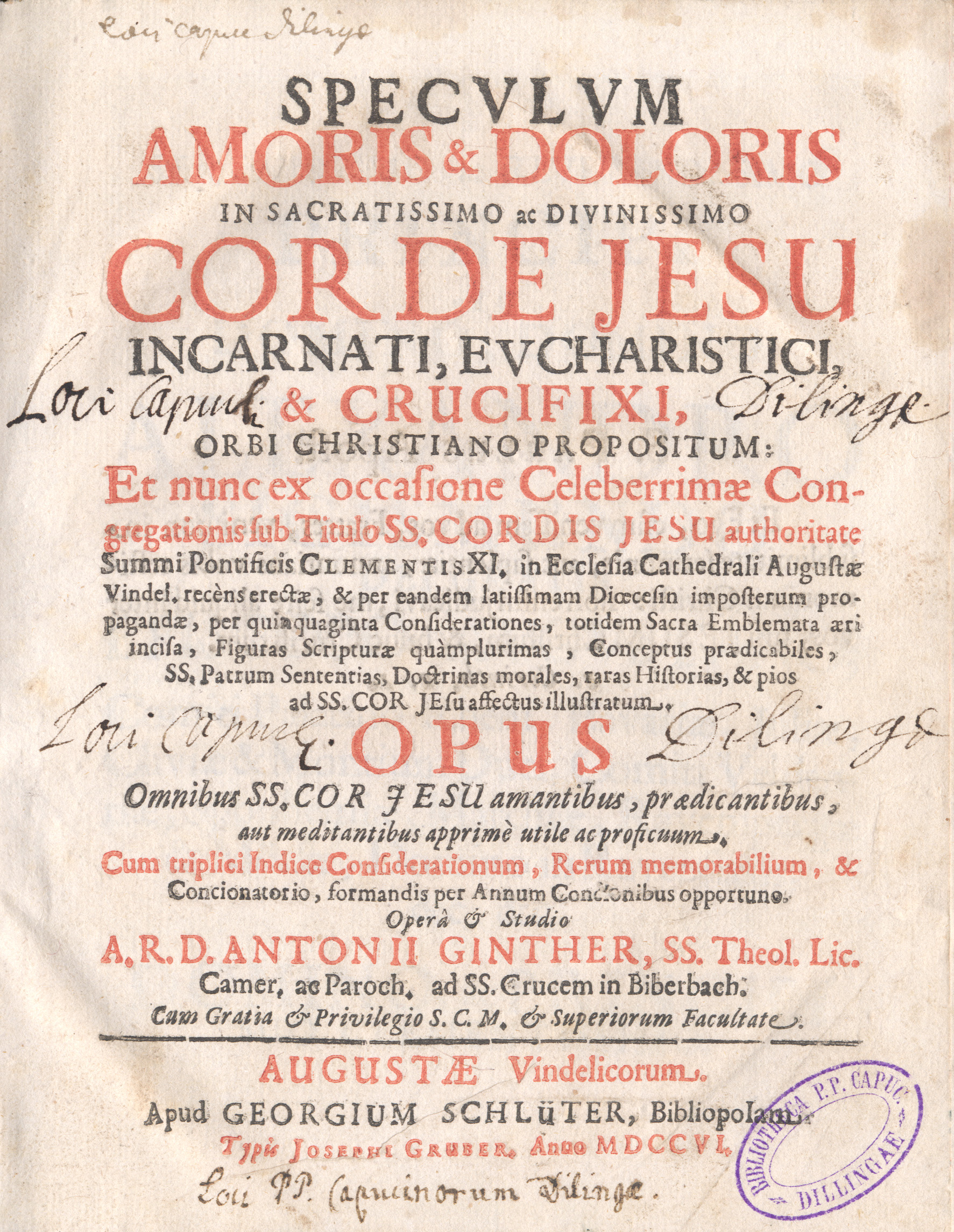 Titelblatt des u.g. Werks.